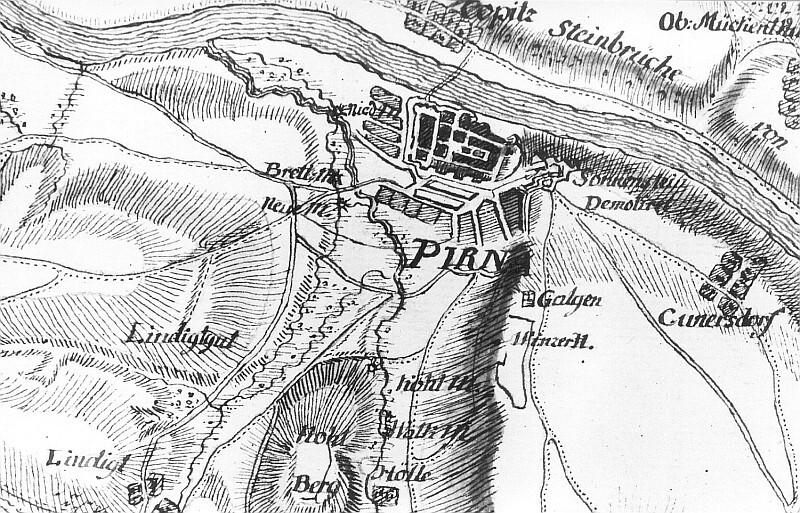 Original image description from the Deutsche Fotothek Pirna. Karte von einem Teil des Kurfürstentums Sachsen, Petri, nach 1759 (Sign.: VII 63)